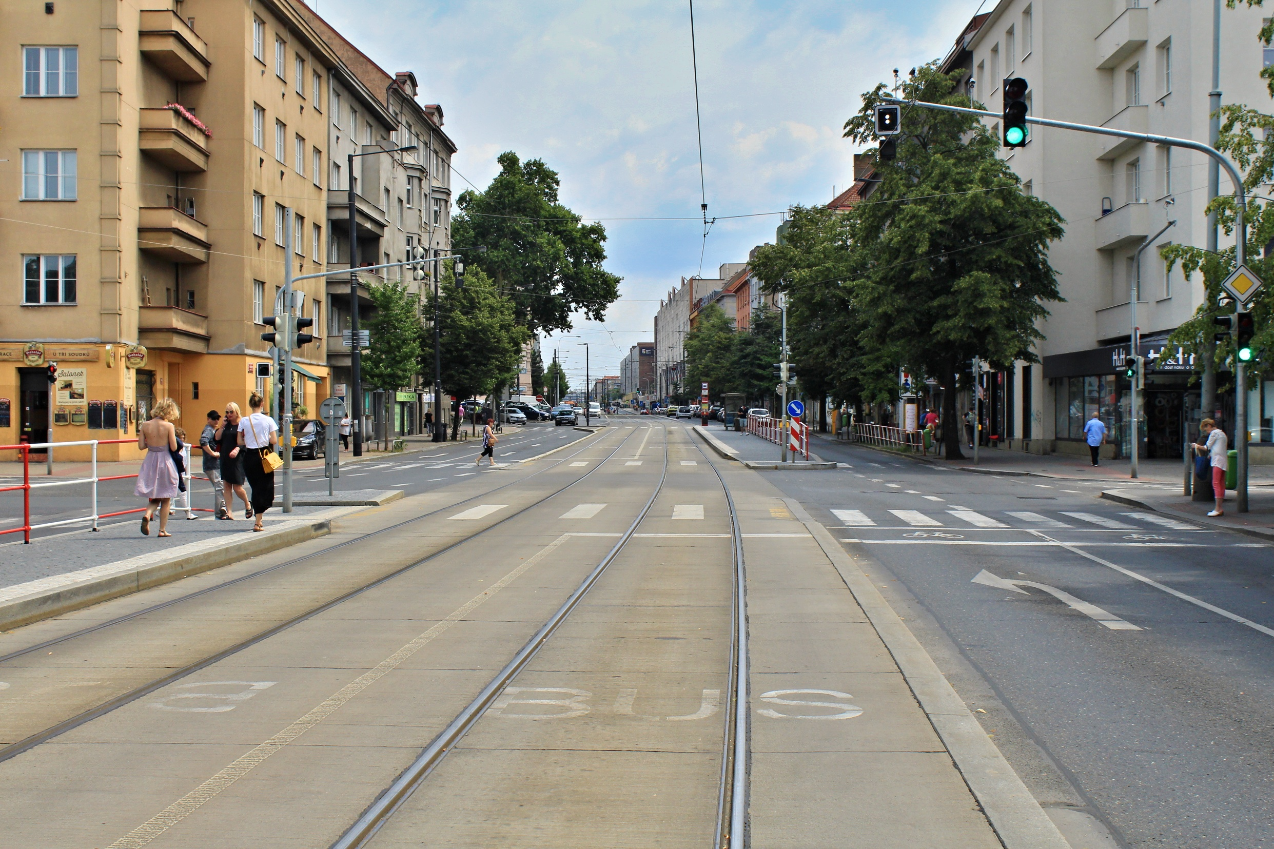 TT Bohemians Vršovice